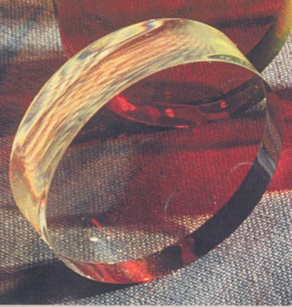 Xérogel de silice. Auteur : EQUILBEY Serge. Licence GFDL Institut d'Optique